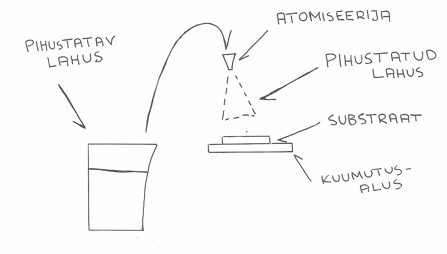 Pihustuspürolüüsi üldine skeem